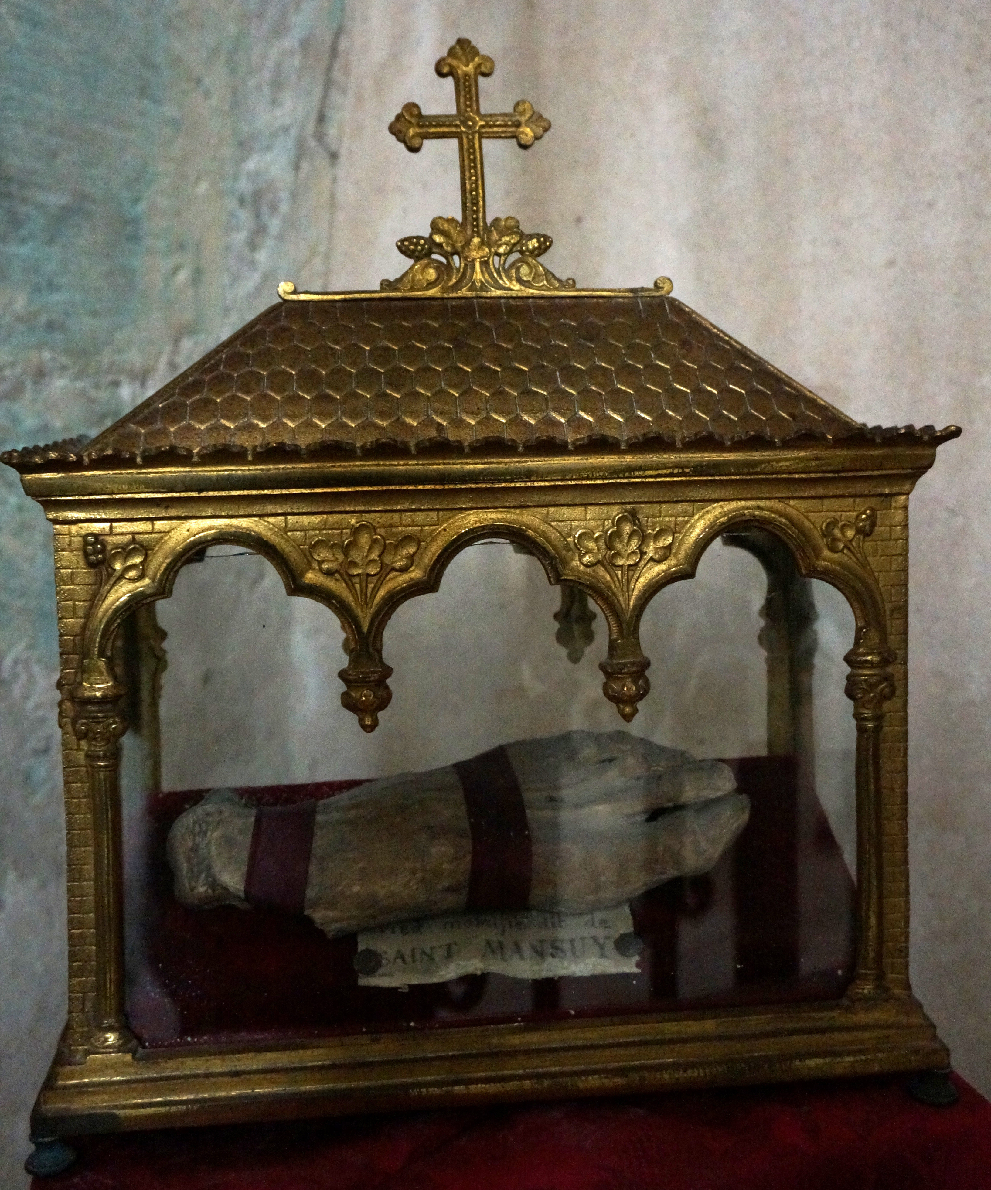 en la cathédrale.